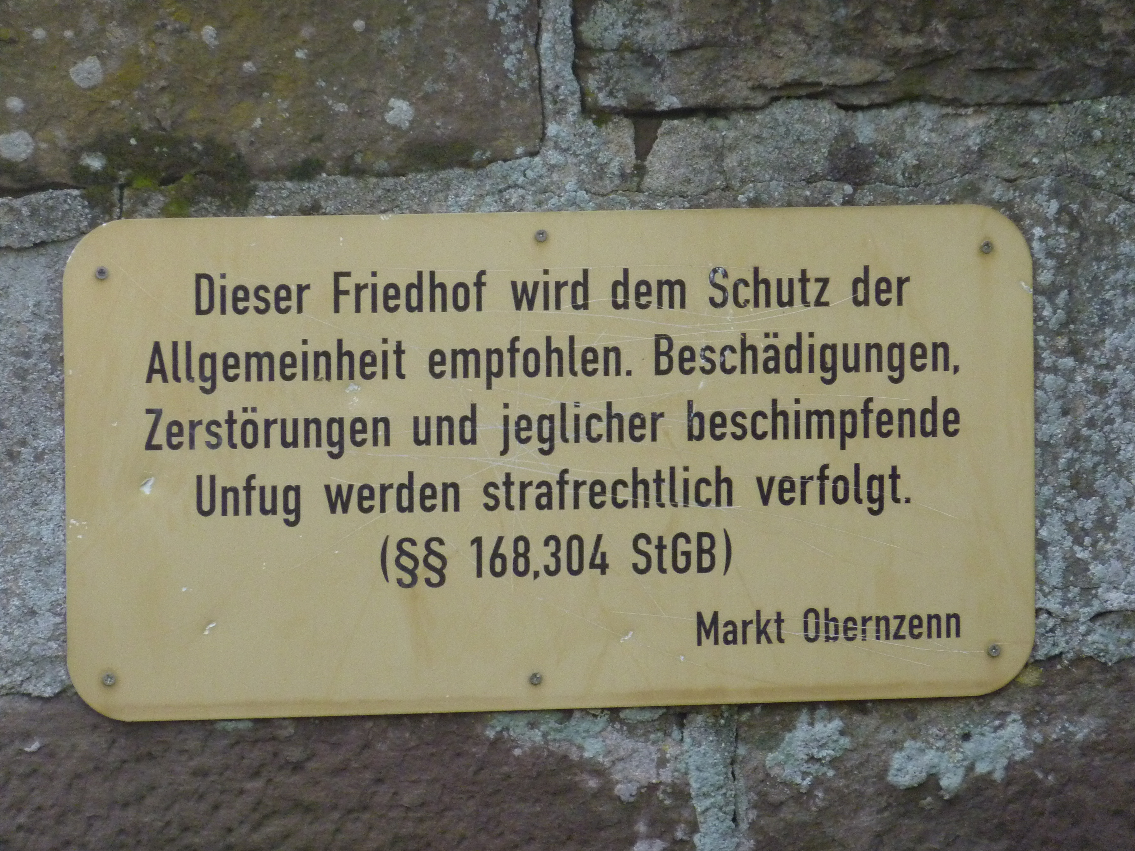 Schild an der Mauer des jüdischen Friedhofs Obernzenn